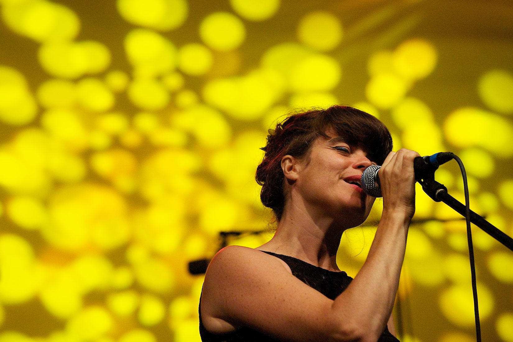 Françoiz Breut beim Würzburger Hafensommer am 06.08.2010